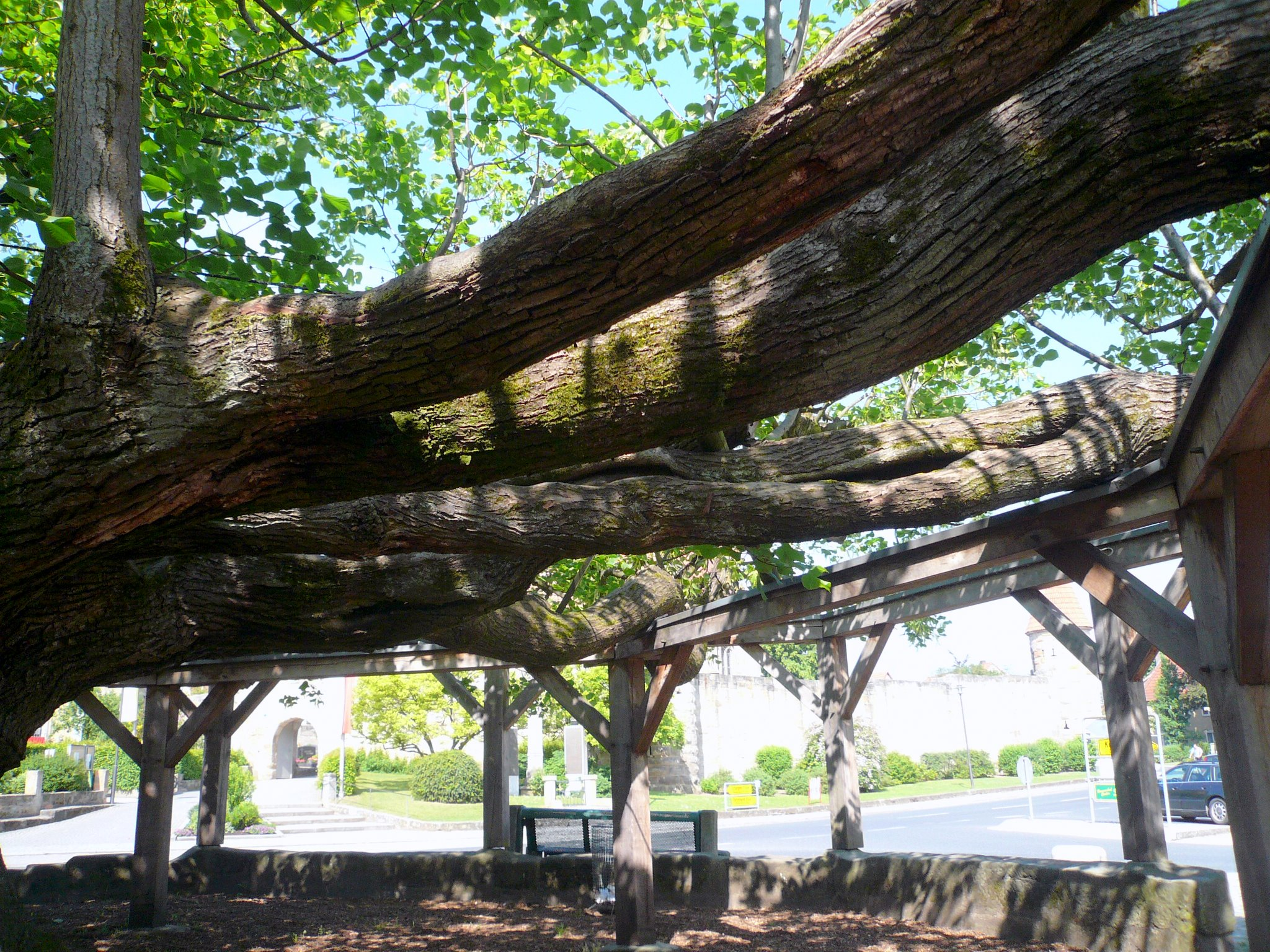 Tanzlinde in Effeltrich